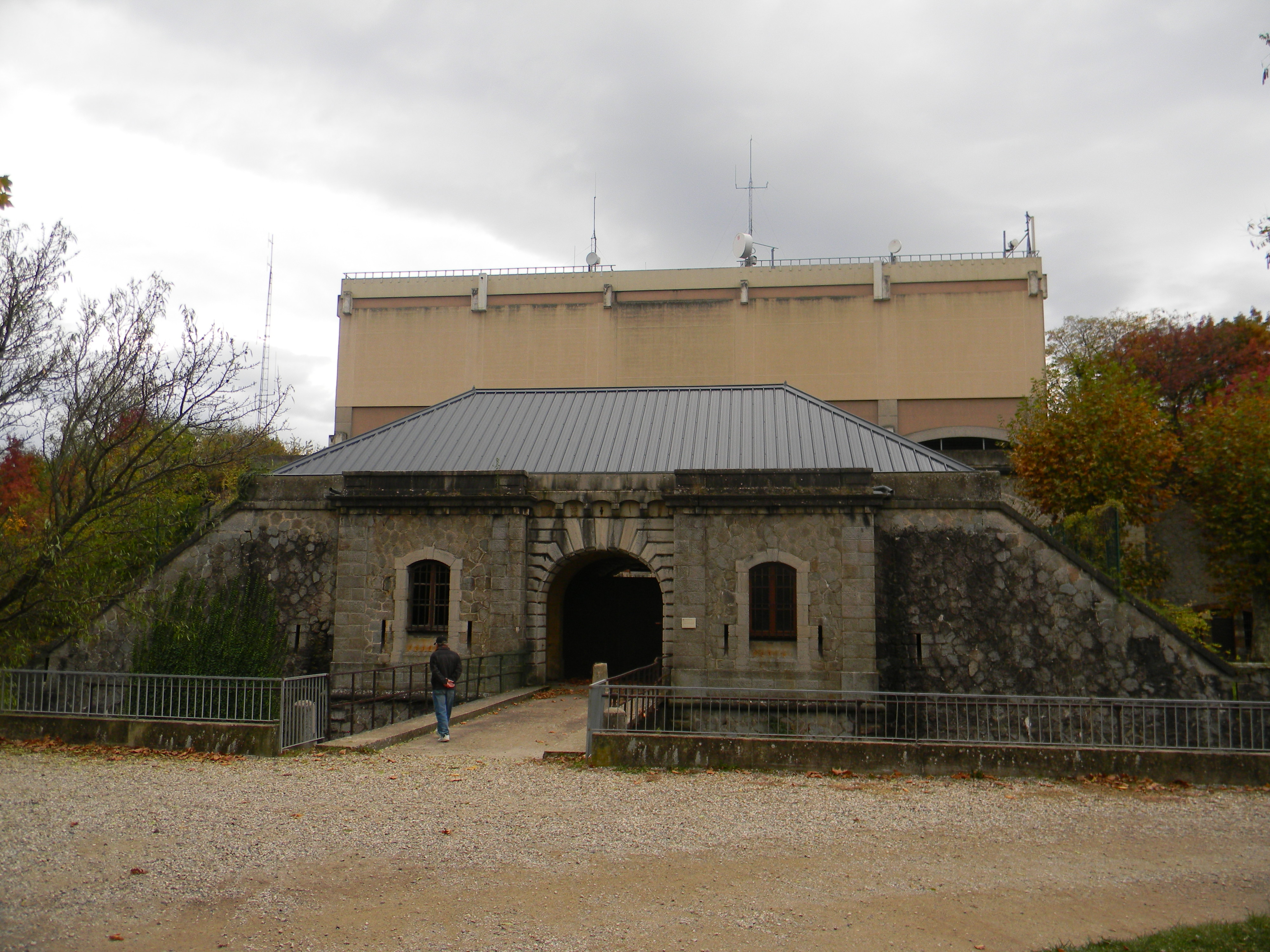 L'entrée par le pont de la façade arrière du Fort de Côte-Lorette. Le bâtiment rose au dessus est un château d'eau construit ultérieurement.